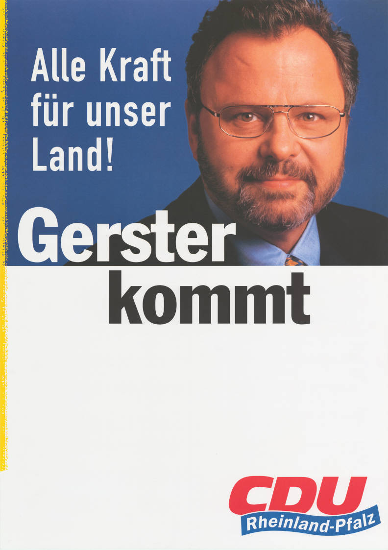 Alle Kraft für unser Land! Gerster kommt CDU Rheinland-Pfalz Abbildung: Porträtfoto Plakatart: Blanko-/Ankündigungsplakat Auftraggeber: CDU Rheinland-Pfalz Objekt-Signatur: 10-010 : 900 Bestand: Landtagswahlplakate Rheinland-Pfalz (10-010) GliederungBestand10-18: Landtagswahlplakate Rheinland-Pfalz (10-010) » CDU Lizenz: KAS/ACDP 10-010 : 900 CC-BY-SA 3.0 DE